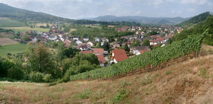 Blick in das Tal der Gemeinde Reichenbach.